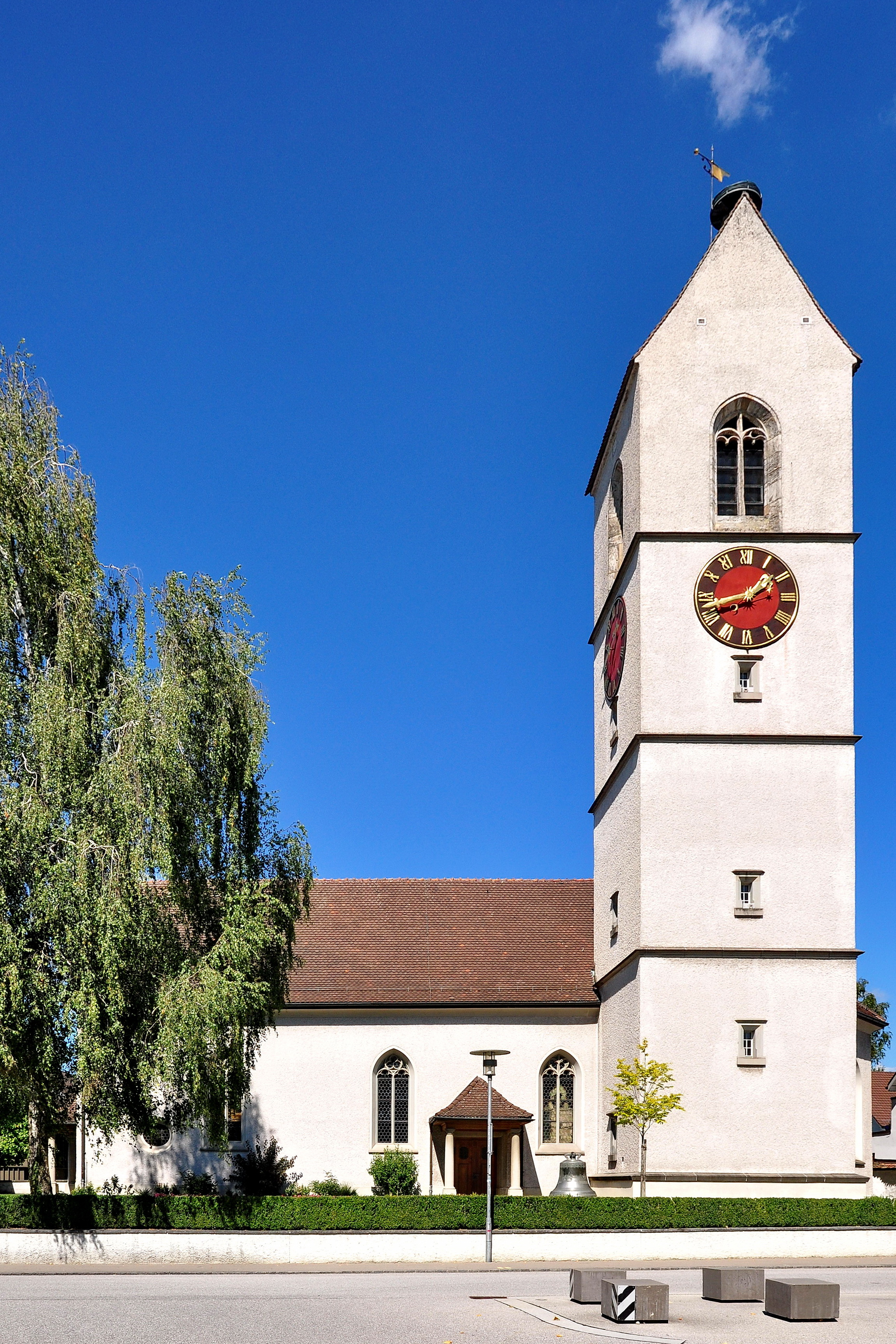 Reformierte Kirche, Dorfstrasse in Wiesendangen (Switzerland)